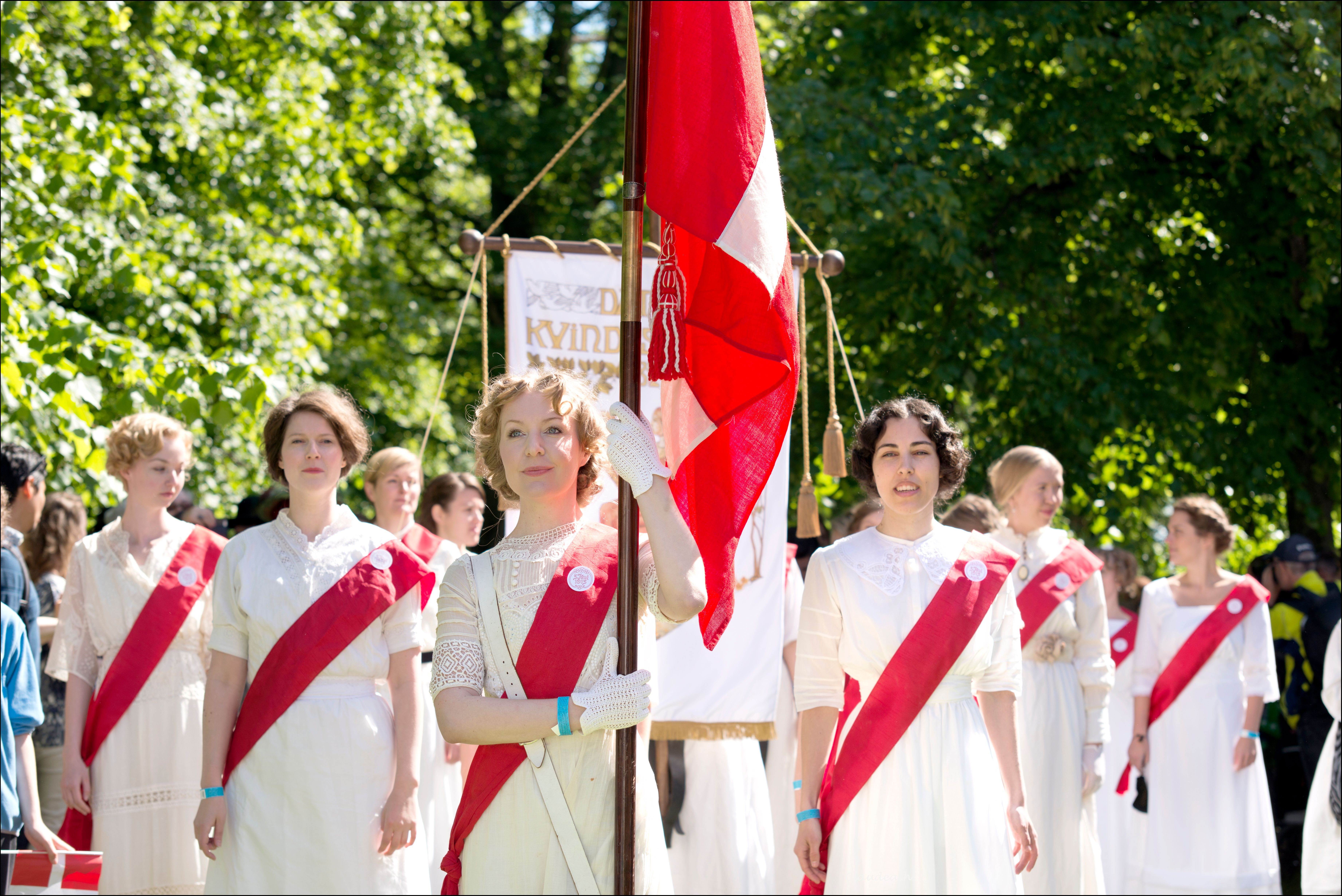 I anledning af 100-året for kvinders valgret i Danmark genopførte op mod 20.000 danske kvinder et historisk optog fra Kastellet i København til Christiansborg. Optoget, der oprindelig fandt sted 5. juni 1915, markerede kvindernes nyvundne stemmeret. Nationalmuseet genopførte altså optoget 100 år senere. Indførslen af kvinders stemmeret i 1915 var resultatet af en mangeårig kamp for ligestilling og demokratiske rettigheder for alle. Indtil 1915 havde kun 15 % af befolkningen ret til at stemme og stille op til valg.